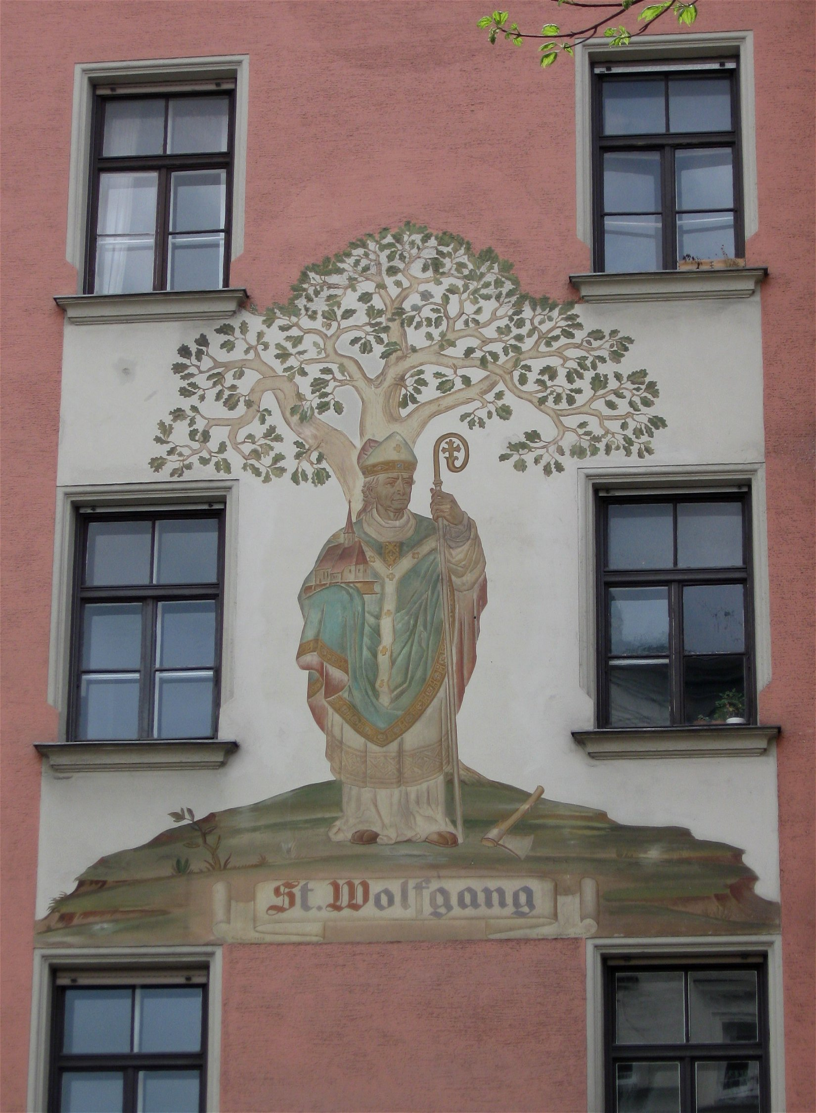 Rosenheimer Straße 108; Mietshaus, stattlicher Eckbau in deutscher Renaissance, mit Erkern, reichem Dekor und Wandgemälden, bez. 1904, von Ernst Günther.